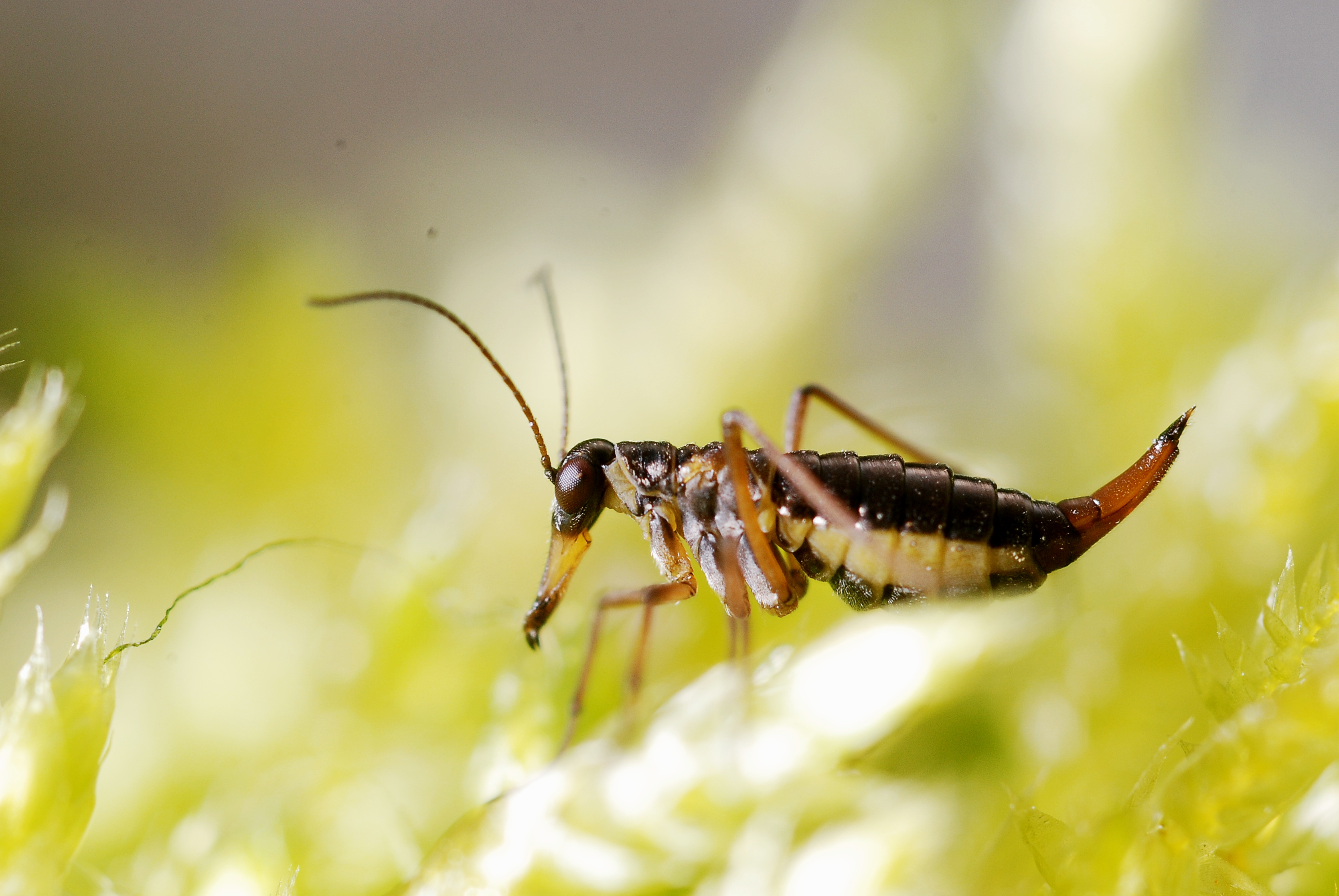 Boreus hyemalis female